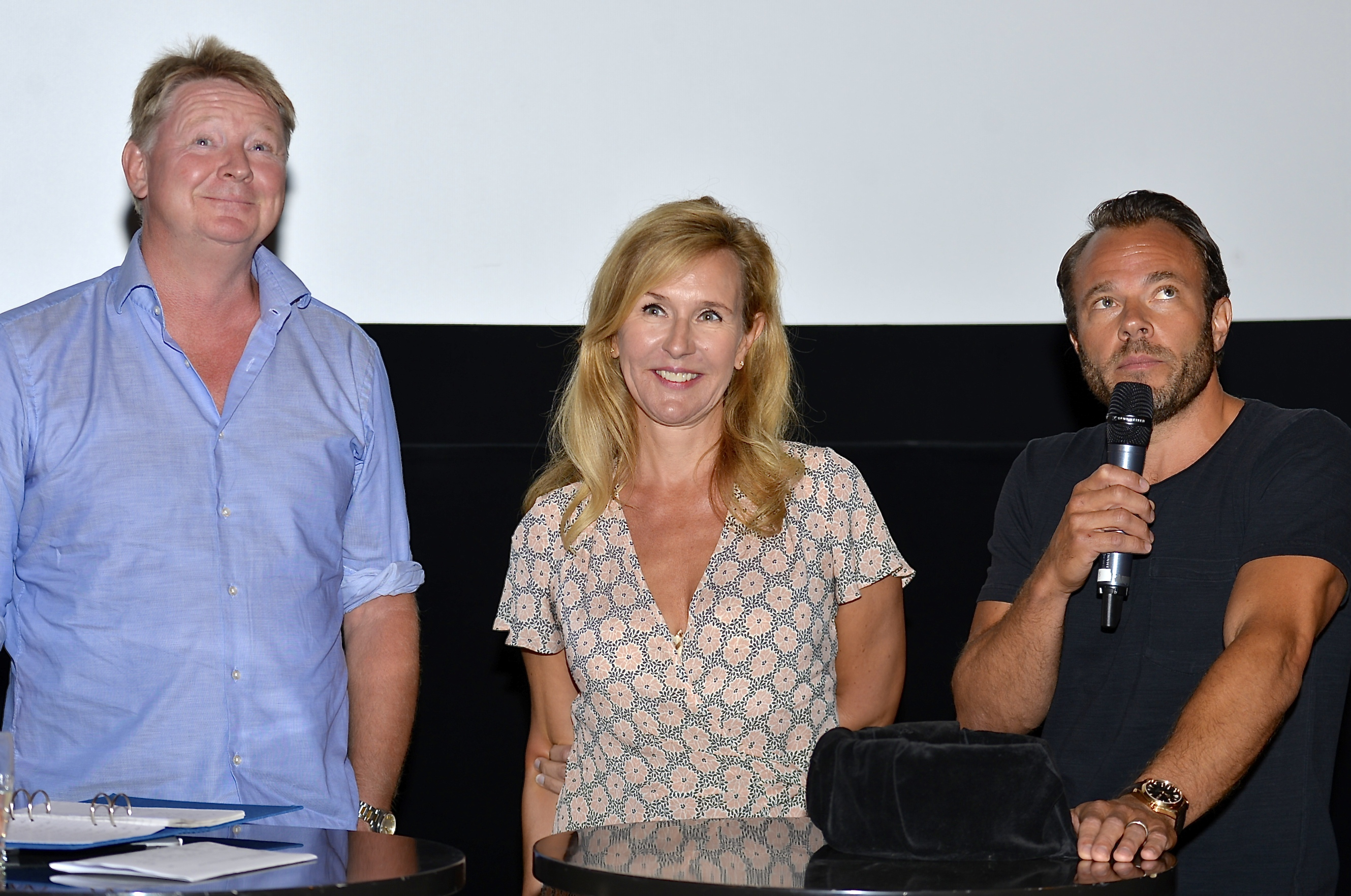 Presentationen av Micke & Veronica i Filmhuset i Stockholm den 18 augusti 2014.